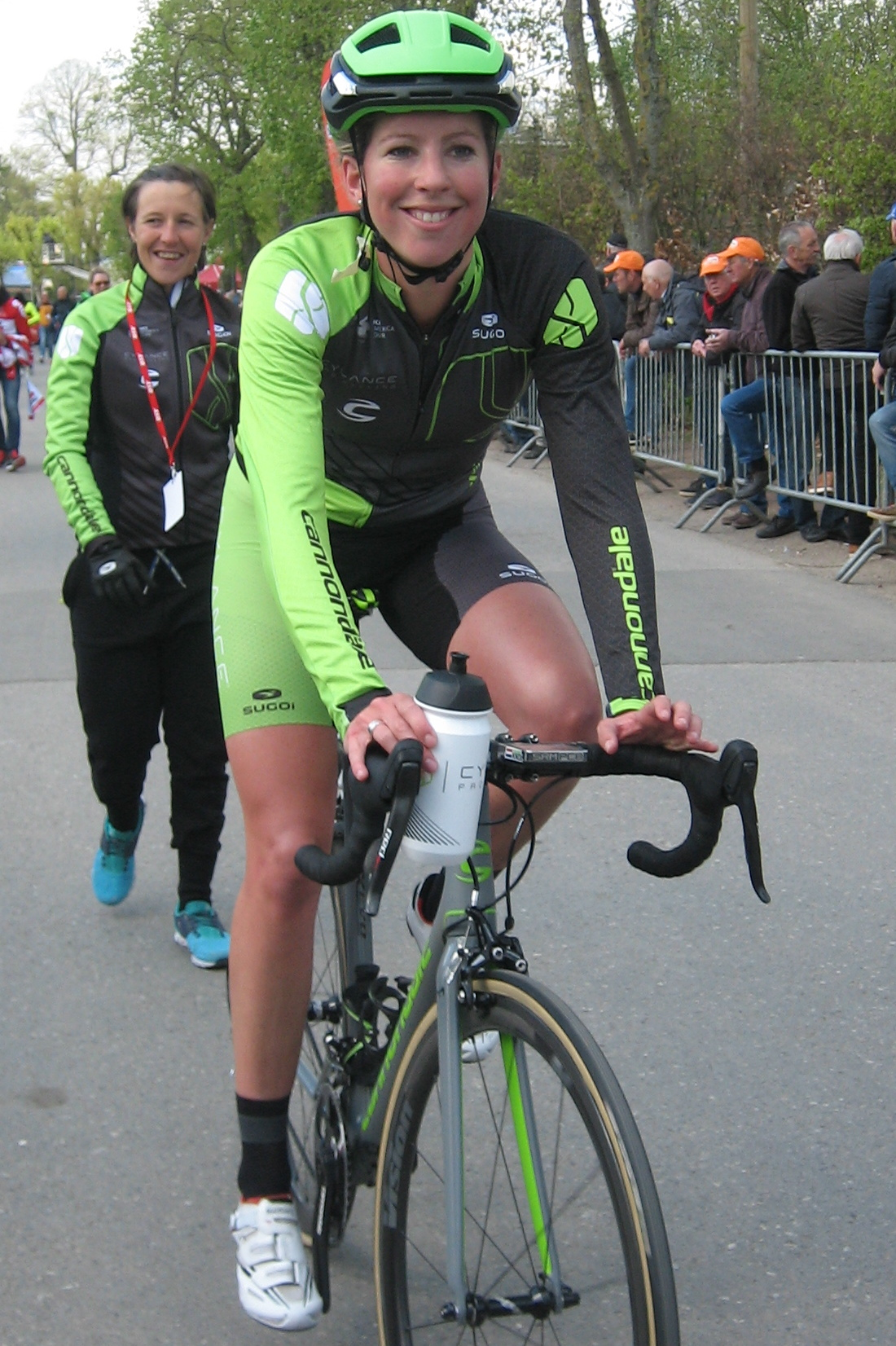 Finish van de Waalse Pijl 2017 in Huy.